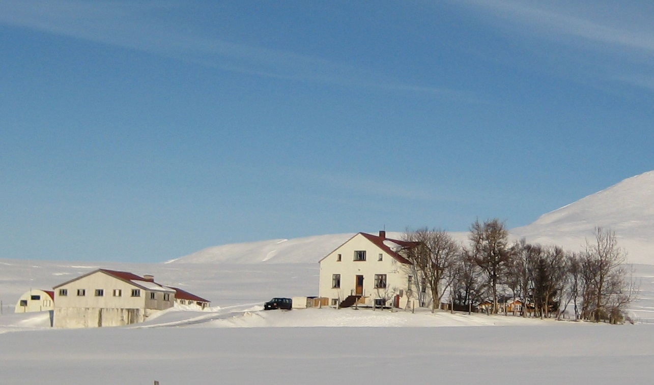 Hánefsstaðir í Svarfaðardal